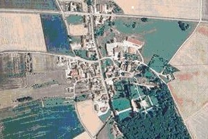 Image satellite de Tremilly